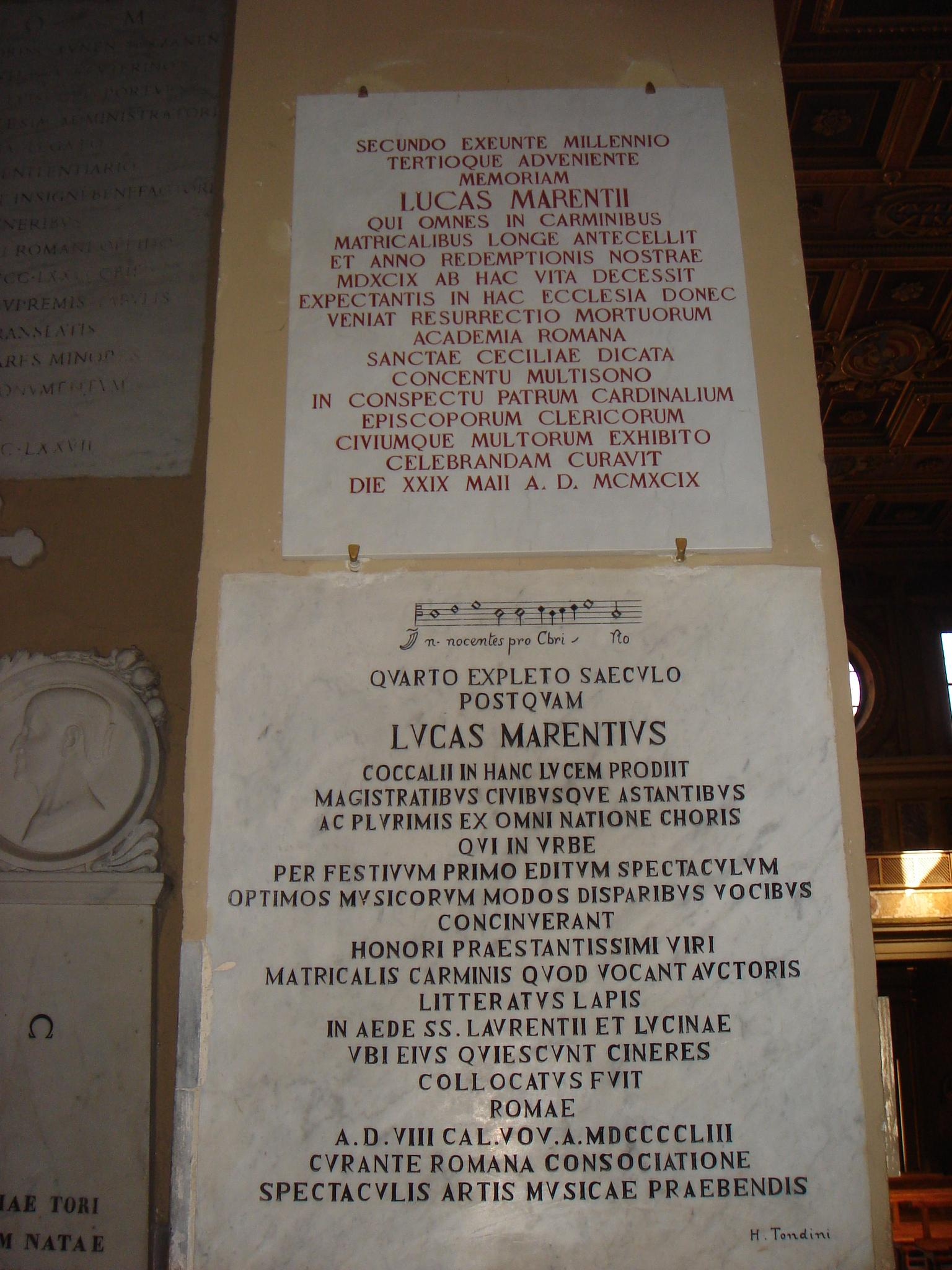 Roma, San Lorenzo in Lucina: due lapidi latine (del 1953 e del 1999) in memoria del compositore Luca Marenzio, che fu sepolto in questa chiesa.